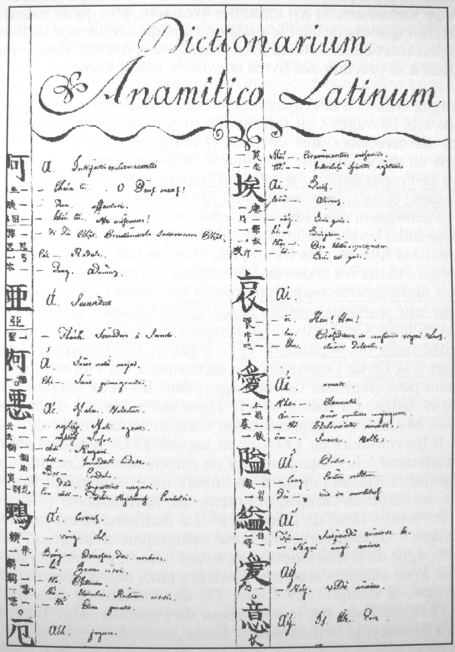 Pigneau_de_Behaine_Annamite_Latin_Dictionary